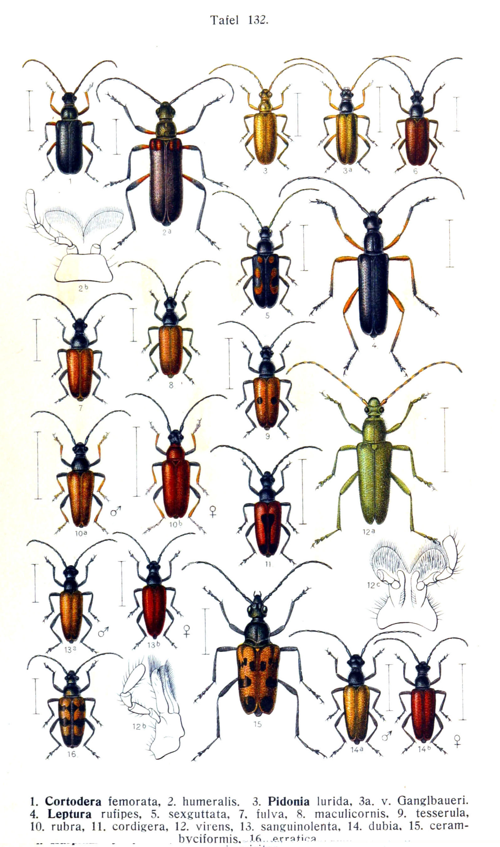 See image for index to numbers. 1. Cortodera femorata F. = Cortodera femorata (Fabricius, 1787), adult, dorsal view 2. Cortodera humeralis Schall. = Cortodera humeralis (Schaller, 1783) (2a: adult, dorsal view, 2b: labium) 3. Pidonia lurida Fbr. = Pidonia lurida (Fabricius, 1792), adult, dorsal view (3a: Pidonia lurida var. ganglbaueri Ormay, adult, dorsal view) 4. Leptura rufipes Schall. = Anoplodera rufipes (Schaller, 1783) (5a: adult male, dorsal view, 5b: adult female, dorsal view) 5. Leptura sexguttata Fbr. = Anoplodera sexguttata (Fabricius, 1775), adult, dorsal view 7. Leptura fulva Degeer = Stictoleptura fulva (De Geer, 1775), adult, dorsal view 8. Leptura maculicornis Deg. = Stictoleptura maculicornis (De Geer, 1775) (8a: adult, dorsal view, 8b: labium) 9. Leptura tesserula Charp. = Stictoleptura tesserula (Charpentier, 1825), adult, dorsal view 10. Leptura rubra Lin. = Stictoleptura rubra (Linnaeus, 1758) (10a: adult male, dorsal view, 10b: adult female, dorsal view) 11. Leptura cordigera Füssly = Stictoleptura cordigera (Füssli 1775), adult, dorsal view 12. Leptura virens Lin. = Lepturobosca virens (Linnaeus, 1758) (12a: adult, dorsal view, 12b: maxilla, 2c: labium) 13. Leptura sanguinolenta Lin. = Anastrangalia sanguinolenta (Linnaeus, 1761), adult, dorsal view 14. Leptura dubia Scop. = Anastrangalia dubia (Scopoli, 1763) (14a: adult male, dorsal view, 14b: adult female, dorsal view) 15. Leptura cerambyciformis Schrnk. = Judolia cerambyciformis (Schrank, 1781), adult, dorsal view 16. Leptura erratica Dalm. = Judolia erratica (Dalman, 1817), adult, dorsal view